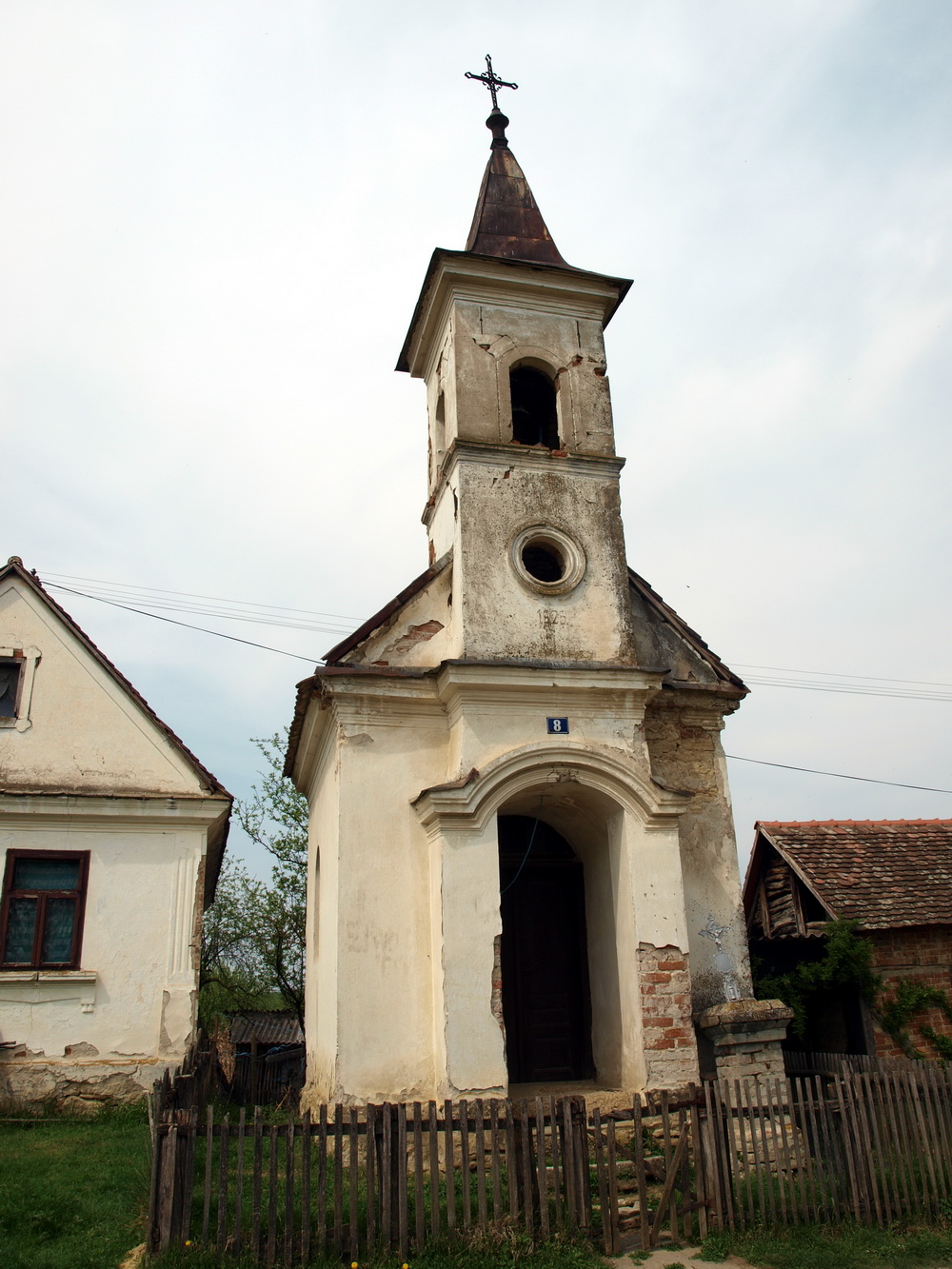 Crkva u selu Matković Mala, Brodsko-posavska županija.